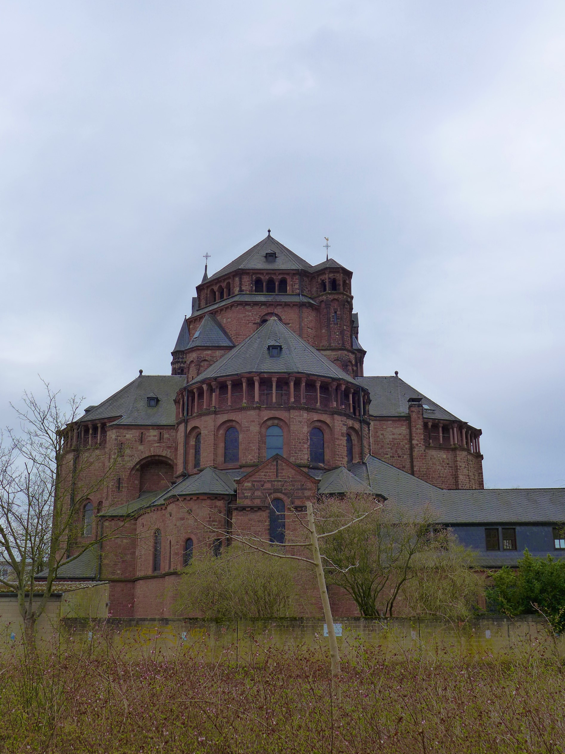 Saardom, Apsisbereich